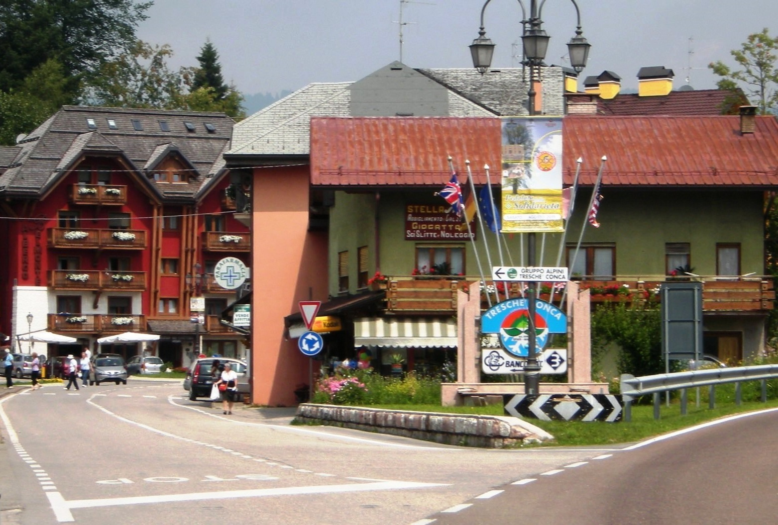 Panorama di Treschè Conca (frazione di Roana)